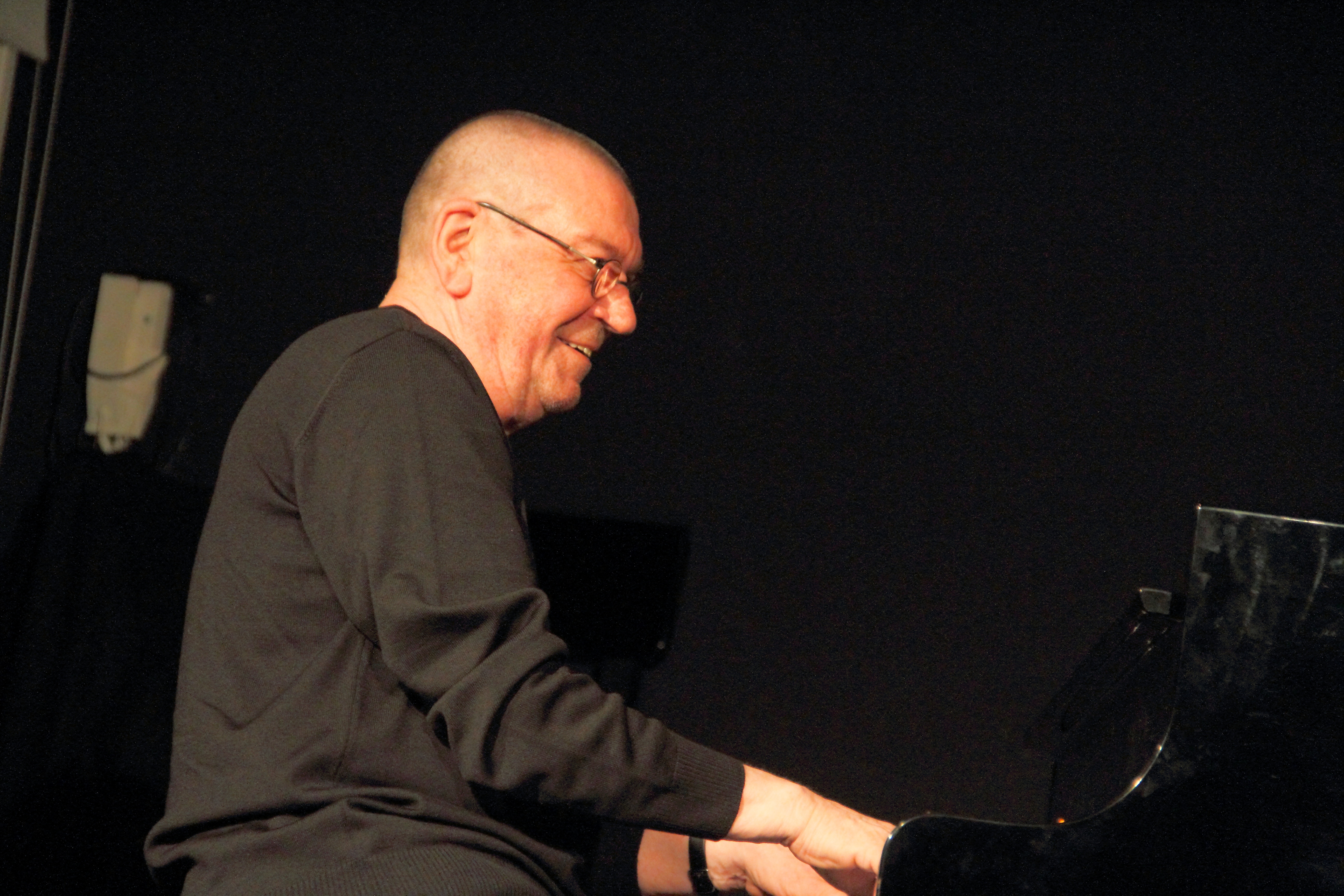 Ulrich Gumpert (Klavier) und Günter "Baby" Sommer (Schlagzeug) mit dem Programm "La Paloma - Das donnernde Leben" im KULT, Niederstetten.